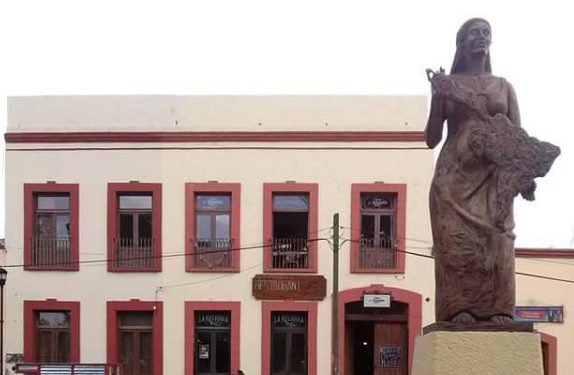 Monumento de la mujer latinoamericana "La patria" en Tlaxco, Tlaxcala